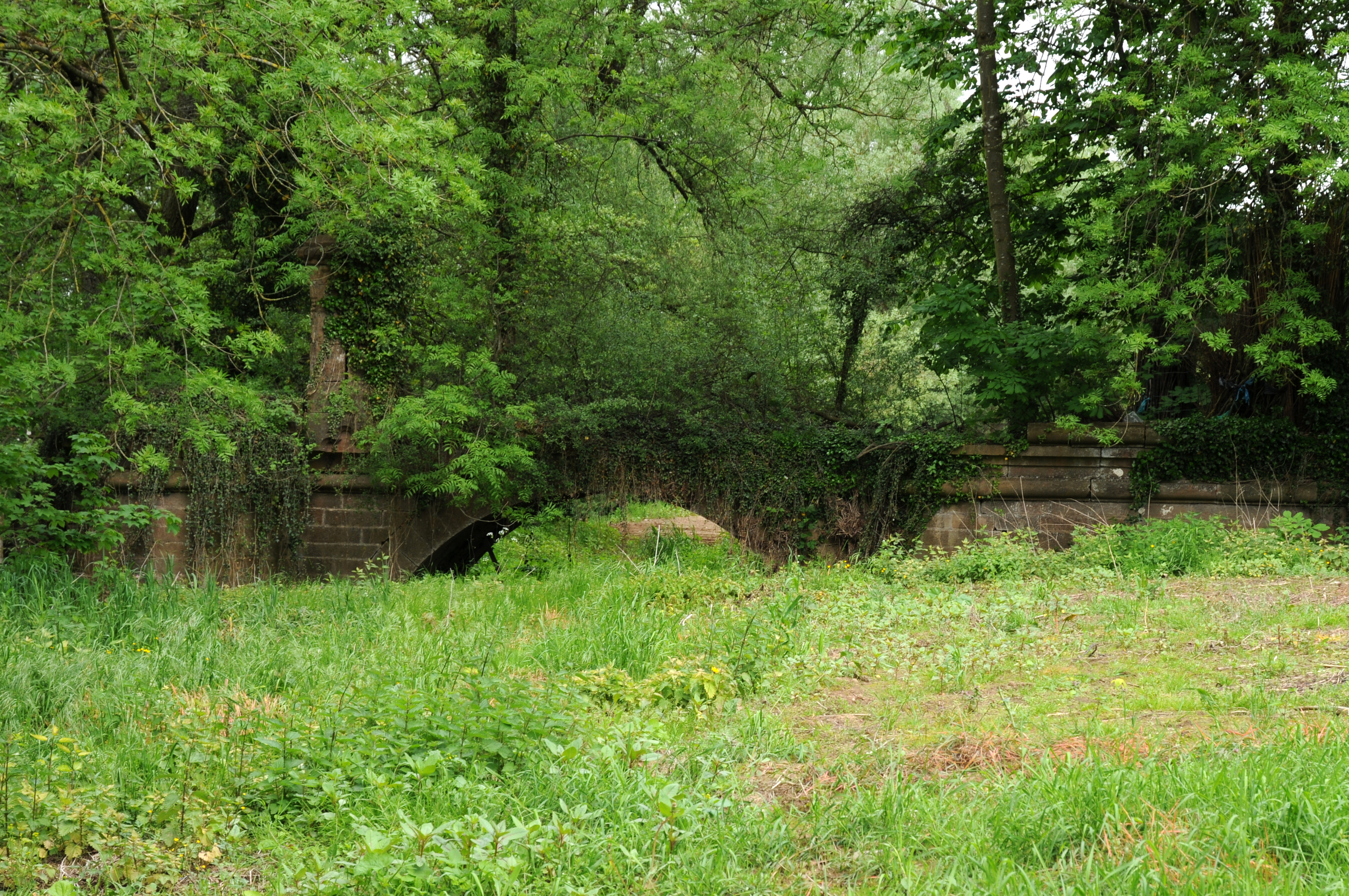 D'Iwwerreschter vun der Schlassbréck iwwer d'Uelzecht bei d'Schlass Biertreng.